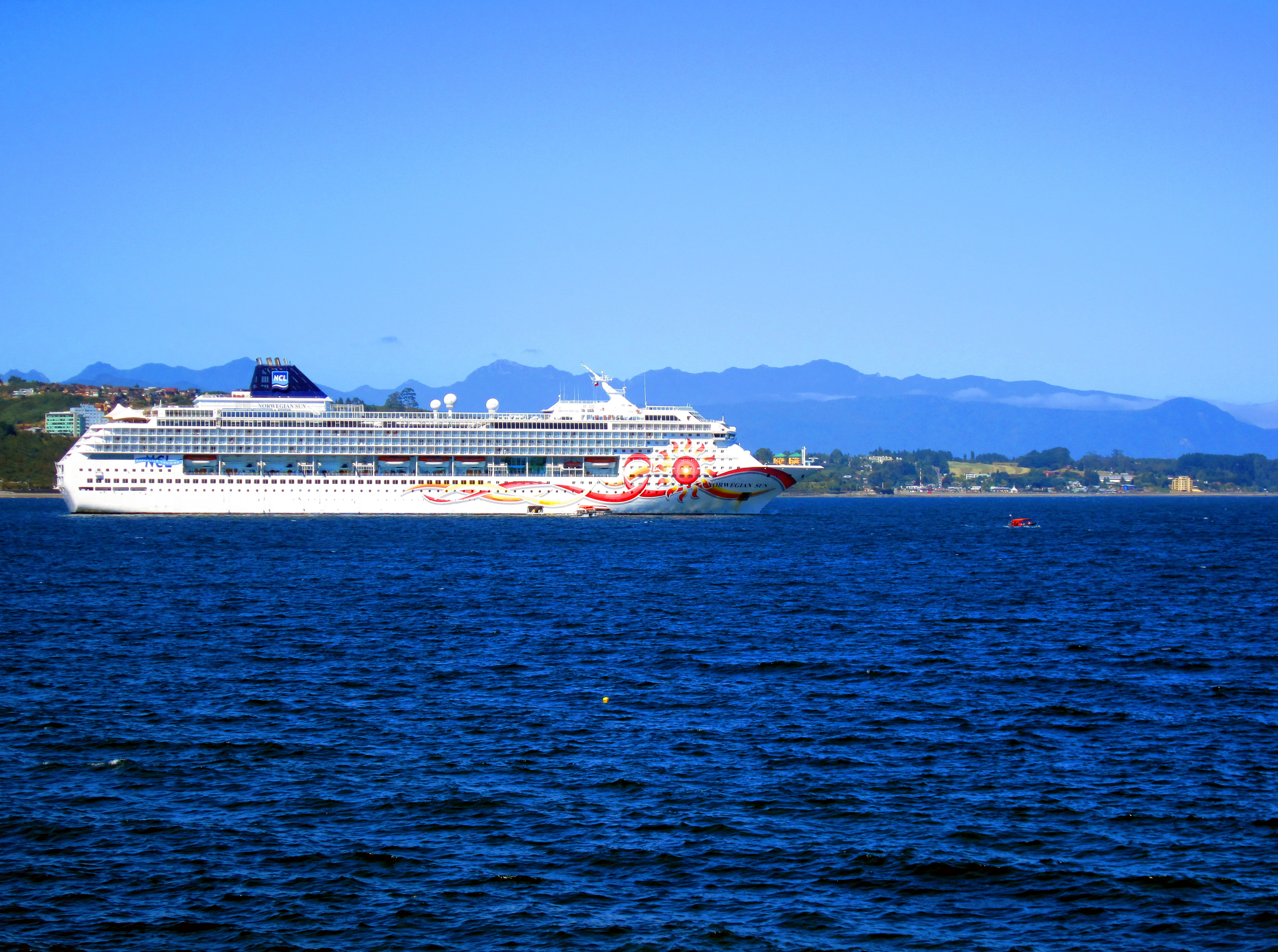 El crucero Norwegian Sun en su paso por la ciudad de Puerto Montt, Chile.